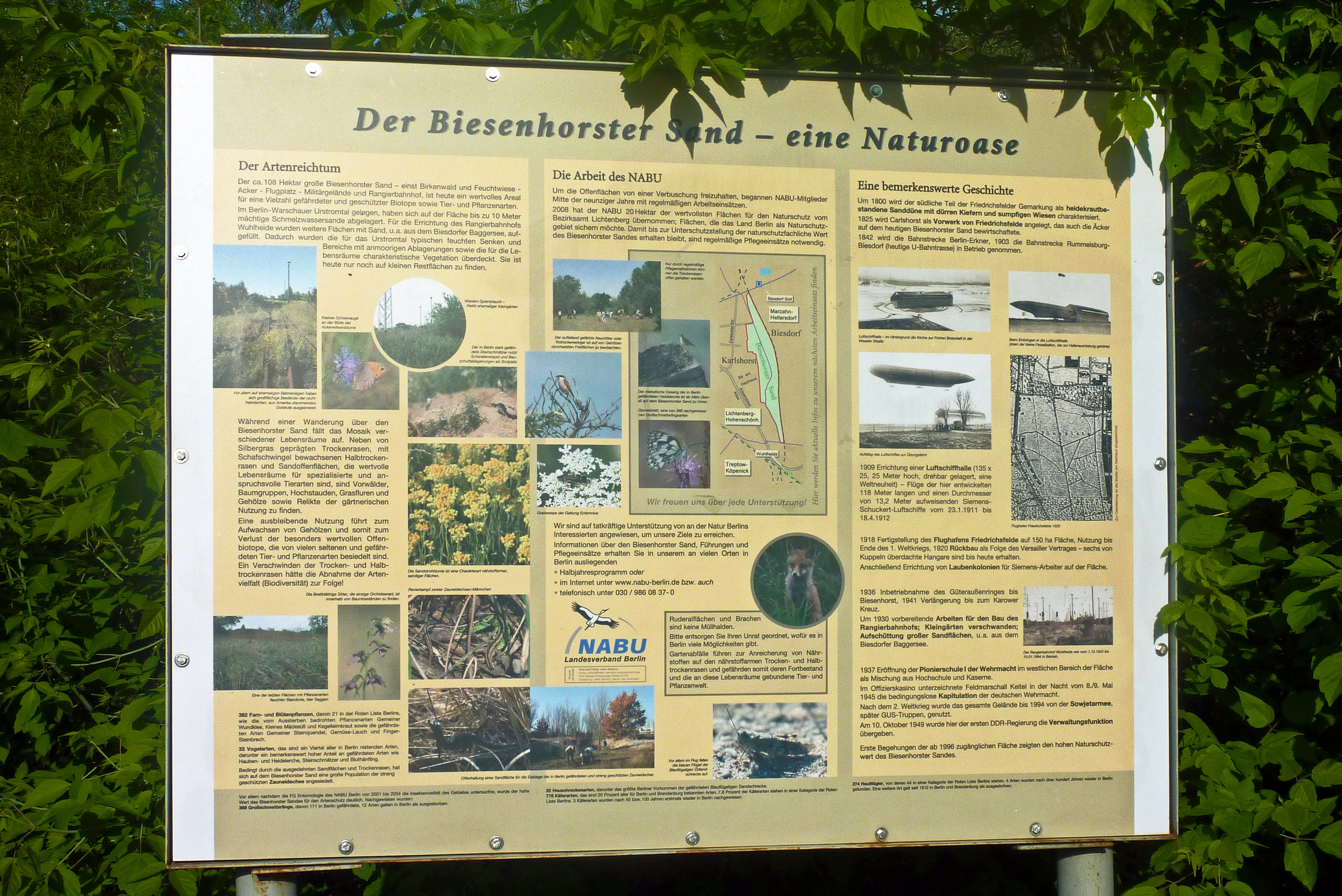 Informationstafel vor dem Biesenhorster Sand am Ende der Straße am Heizhaus in Berlin-Karlshorst.